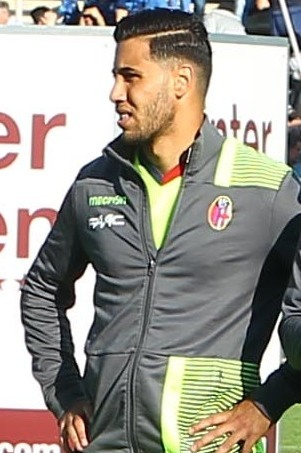 Bergamo, stadio Atleti Azzurri d'Italia, 22 aprile 2017. Il calciatore Saphir Taïder al Bologna, prima della trasferta persa contro l'Atalanta (2-3) e valevole per la 33ª giornata del campionato italiano di Serie A 2016-17.